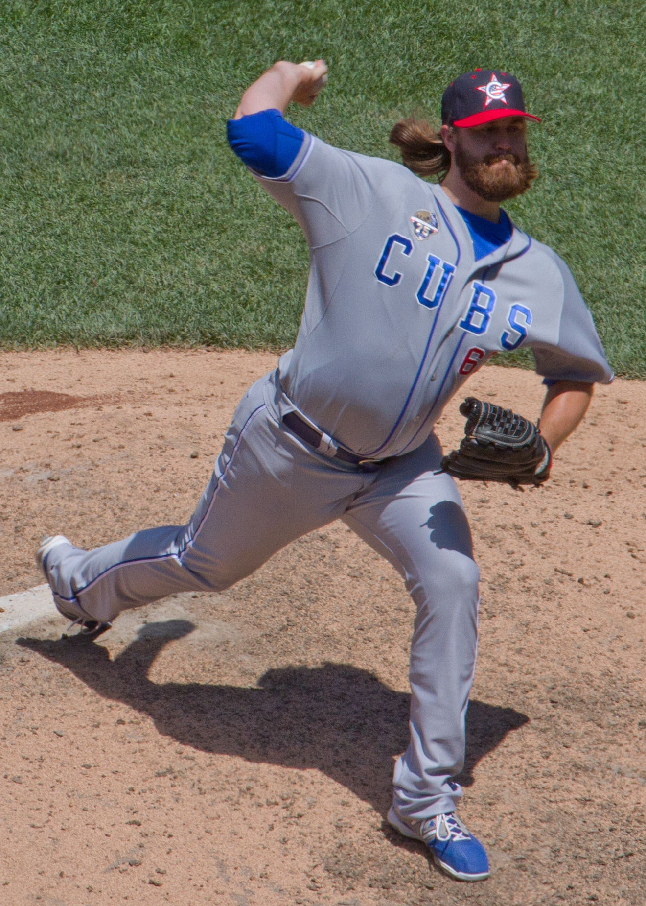 Brian Schlitter